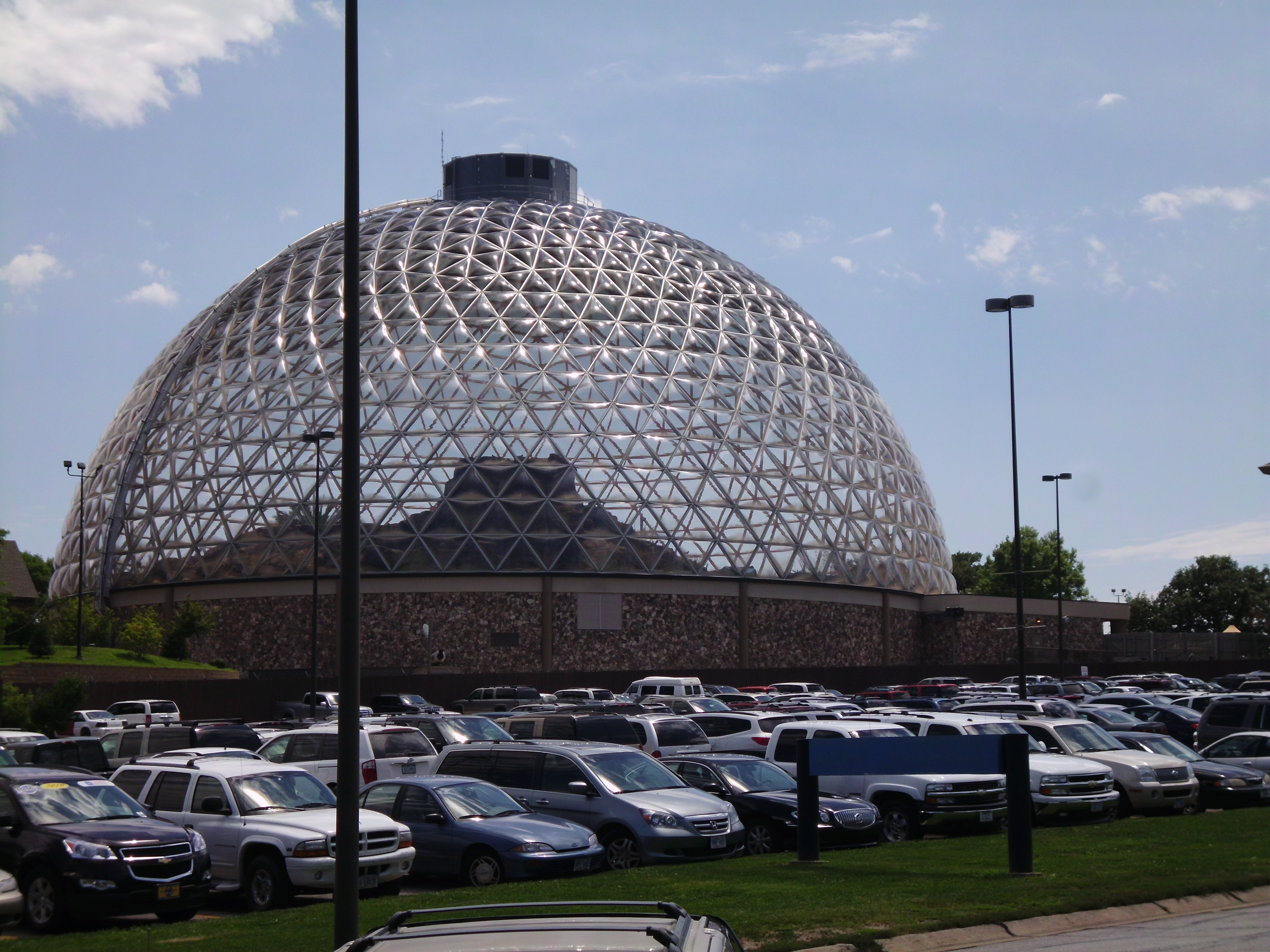 Henry Doorly Zoo Desert Dome.